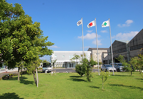 富士車輌株式会社 本社